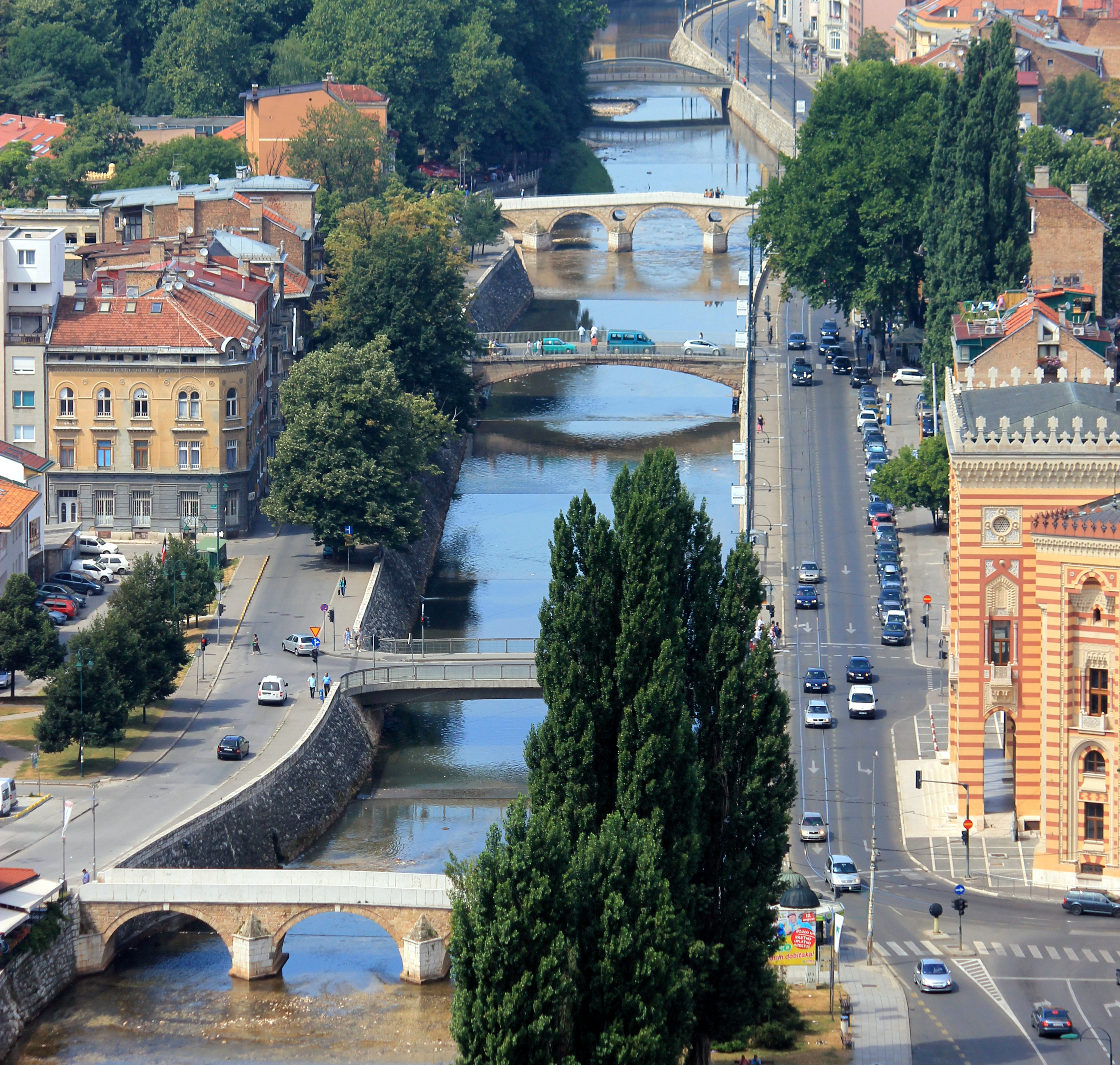 Die Miljacka in Sarajevo.